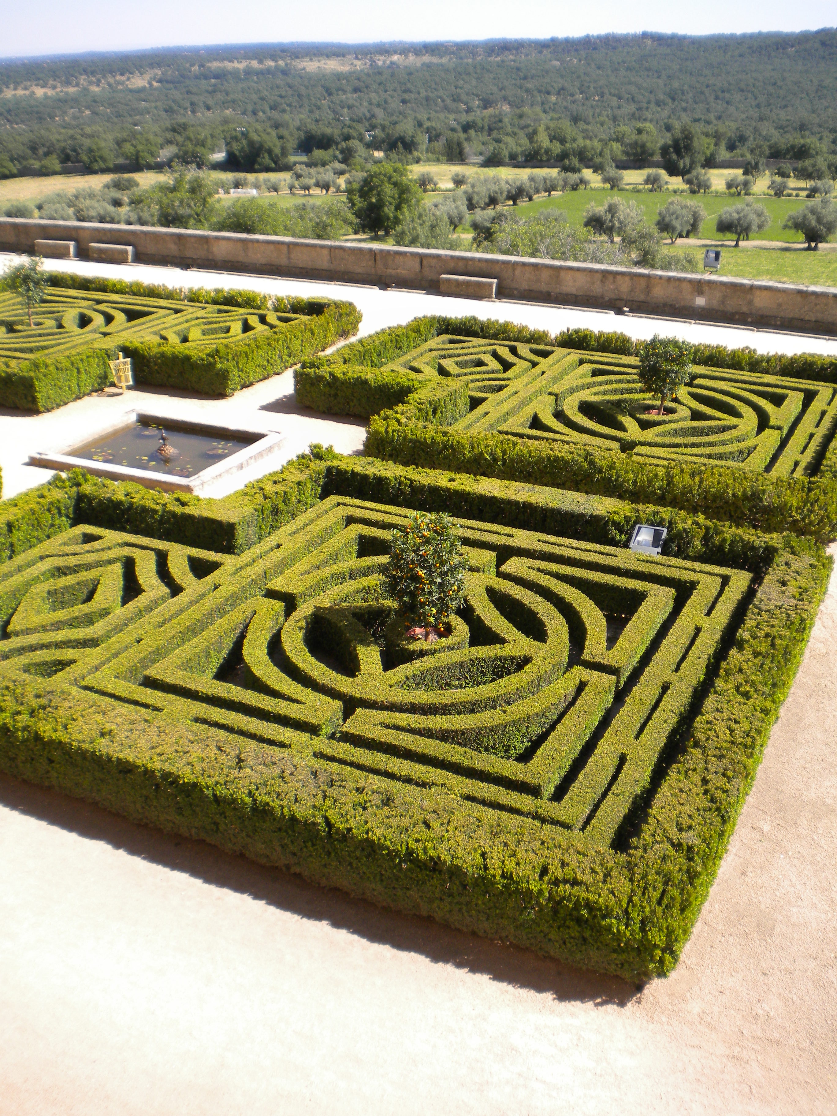 Monastery El Escorial Spain Gardens Old Style Cut Into A Maze Pattern for Walking